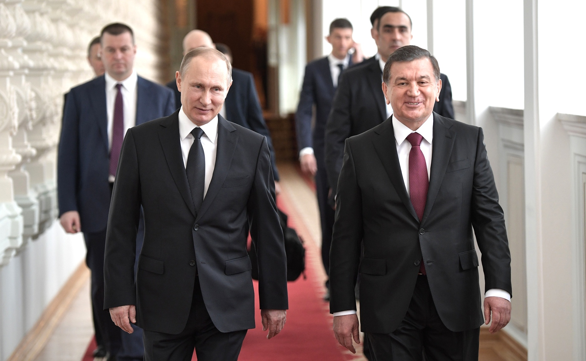 Президент России Владимир Путин с Президентом Узбекистана Шавкатом Мирзиёевым